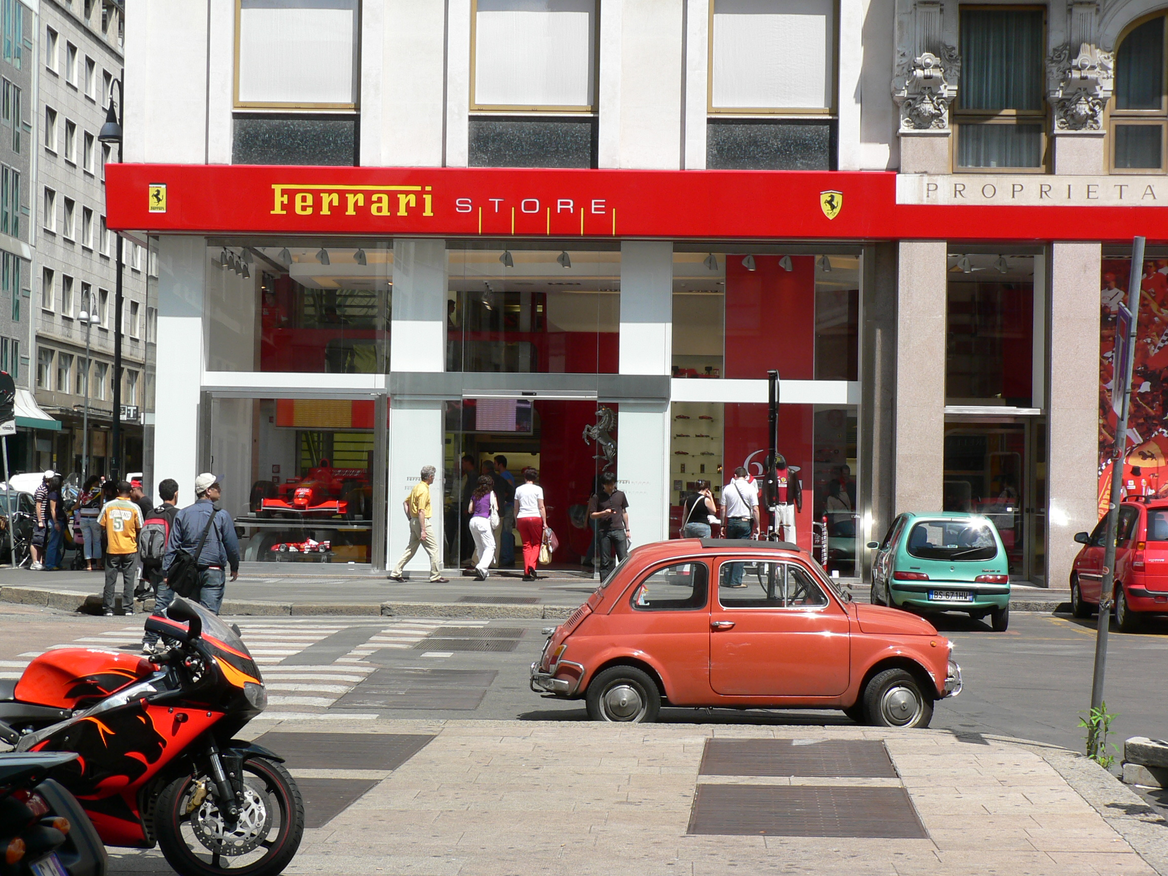 "Ferrari Store" in Piazzetta del Liberty a Milano.